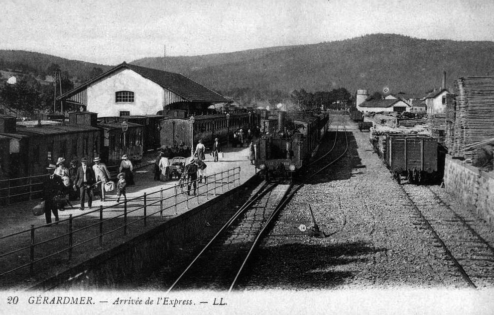 Arrivée de l'express et intérieur de la gare de Gérardmer au début des années 1900.